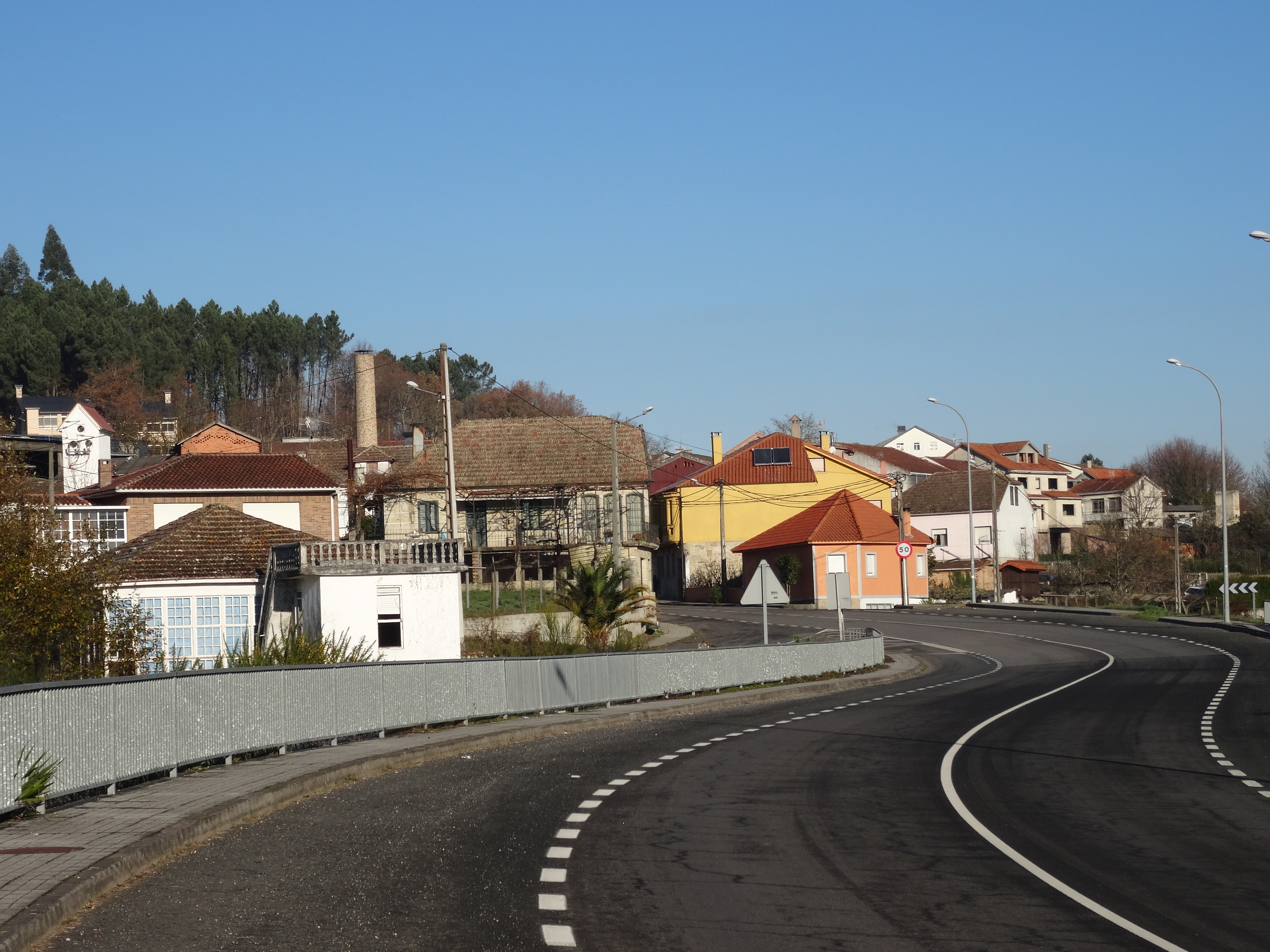 Ver título.